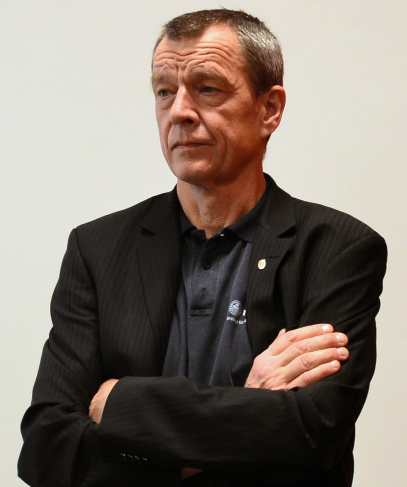 Klaus Püschel, Vortrag im Niedersächsischen Landesamt für Denkmalpflege zu Exhumierung und Identifizierung von Soldaten und Flugzeugbesatzungen aus dem Zweiten Weltkrieg